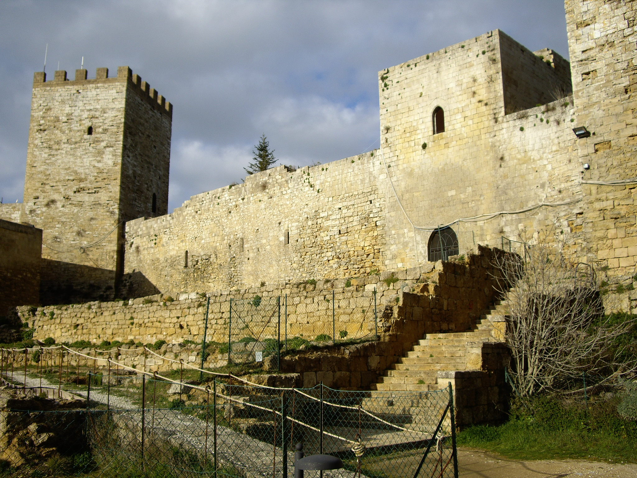 Lonbardiar gaztelua